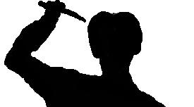 Simulación de escena